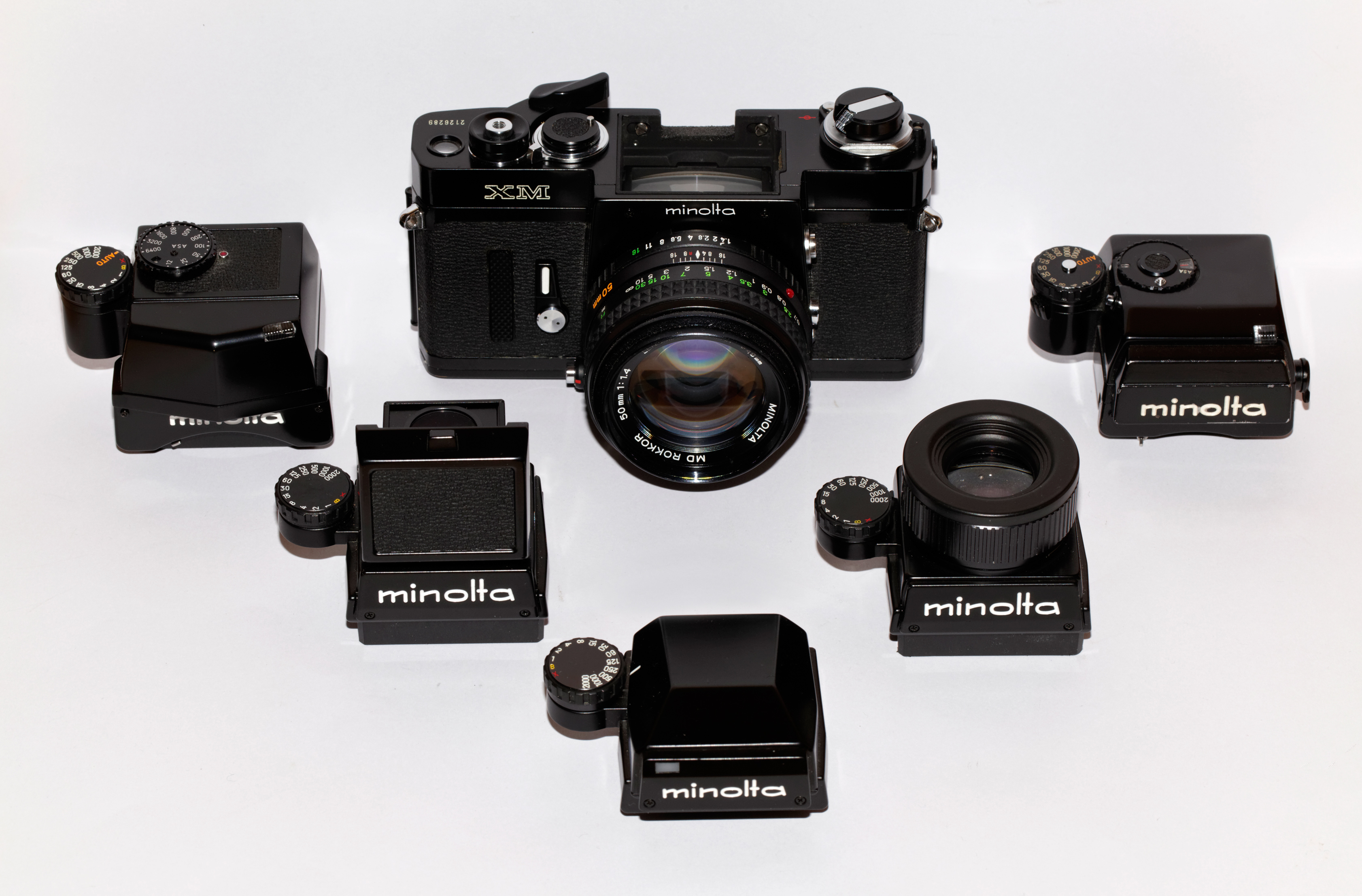 Minolta XM mit allen Suchern und 1.4/50mm Objektiv